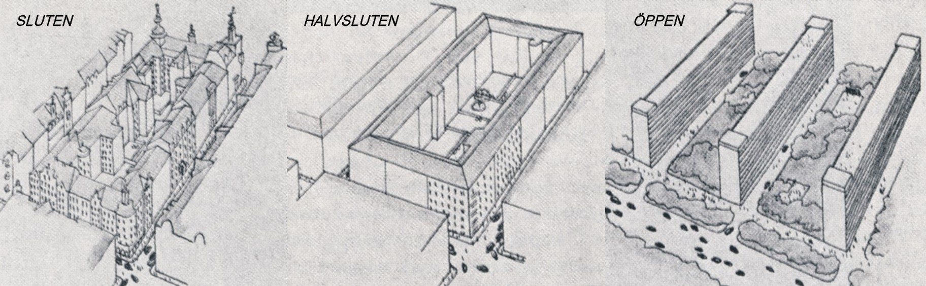 Illustration över utvecklingen från det gamla slutna stadsplanesystemet till det nya öppna